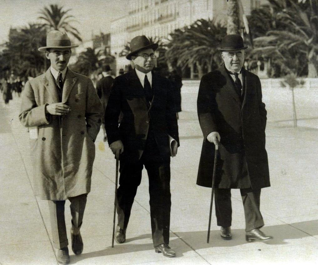 Soldan sağa: Məhəmməd Məhərrəmov, Miryaqub Mehdiyev, Əlimərdan bəy Topçubaşov, Fransa, 1920-ci illər